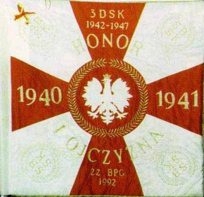 Sztandar 3 Dywizji Strzelców Karpackich (replika, prawa strona)